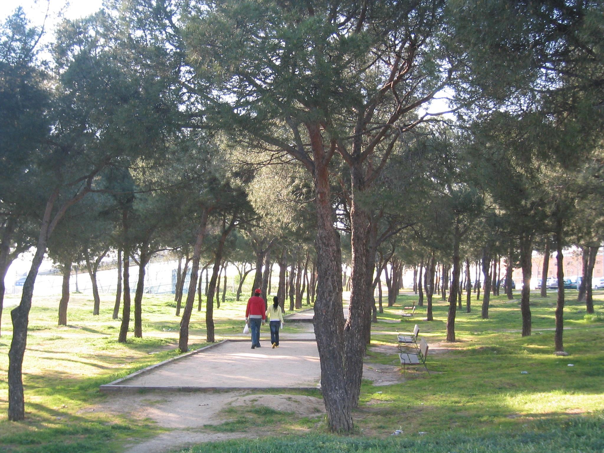 Pinar del Campo de Tiro, cercano a la estación de metro de San Nicasio (se ve al fondo, pertenece a la línea 11 del Metro de Madrid). España